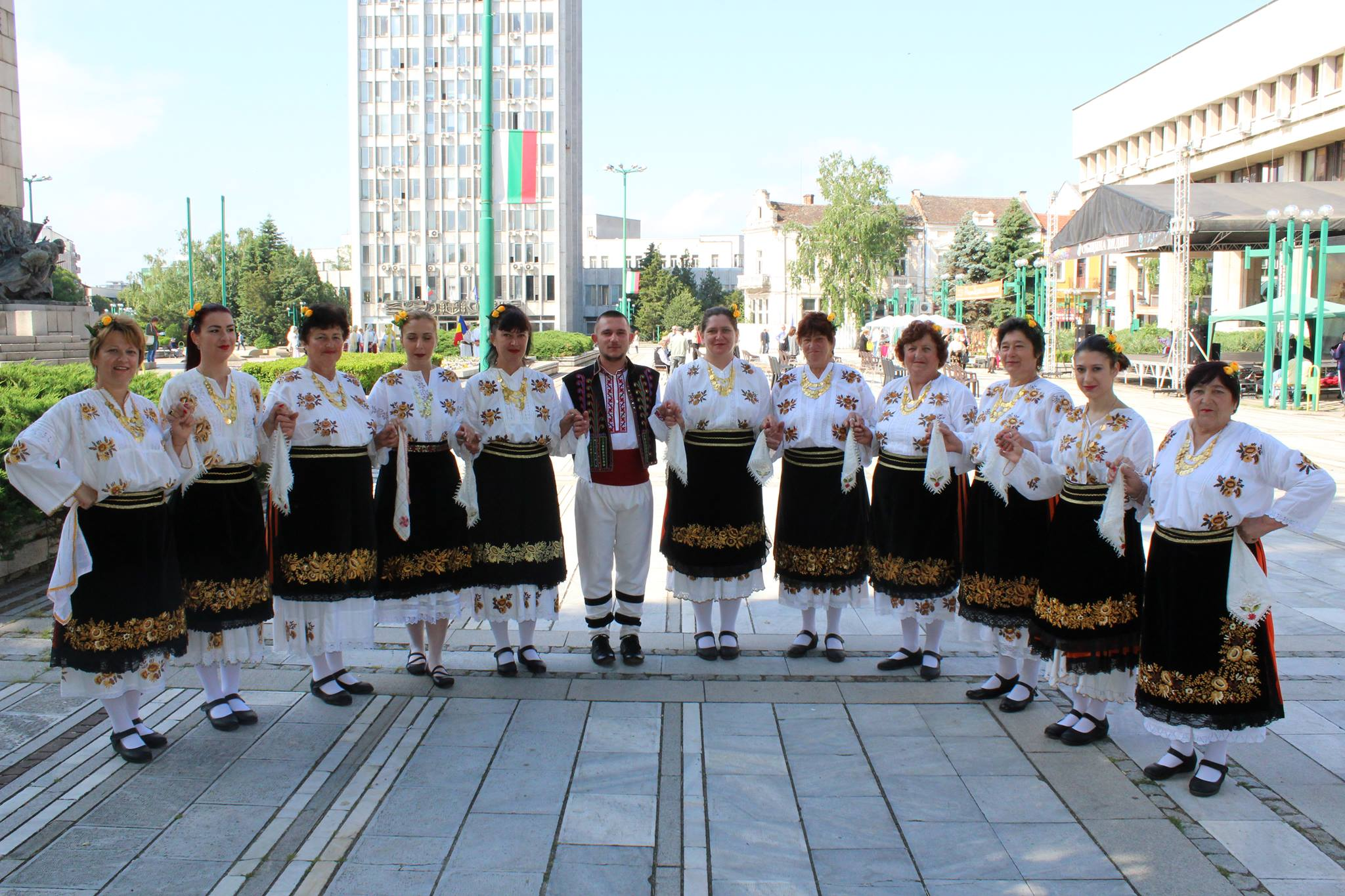 ФТС "Влаинките"